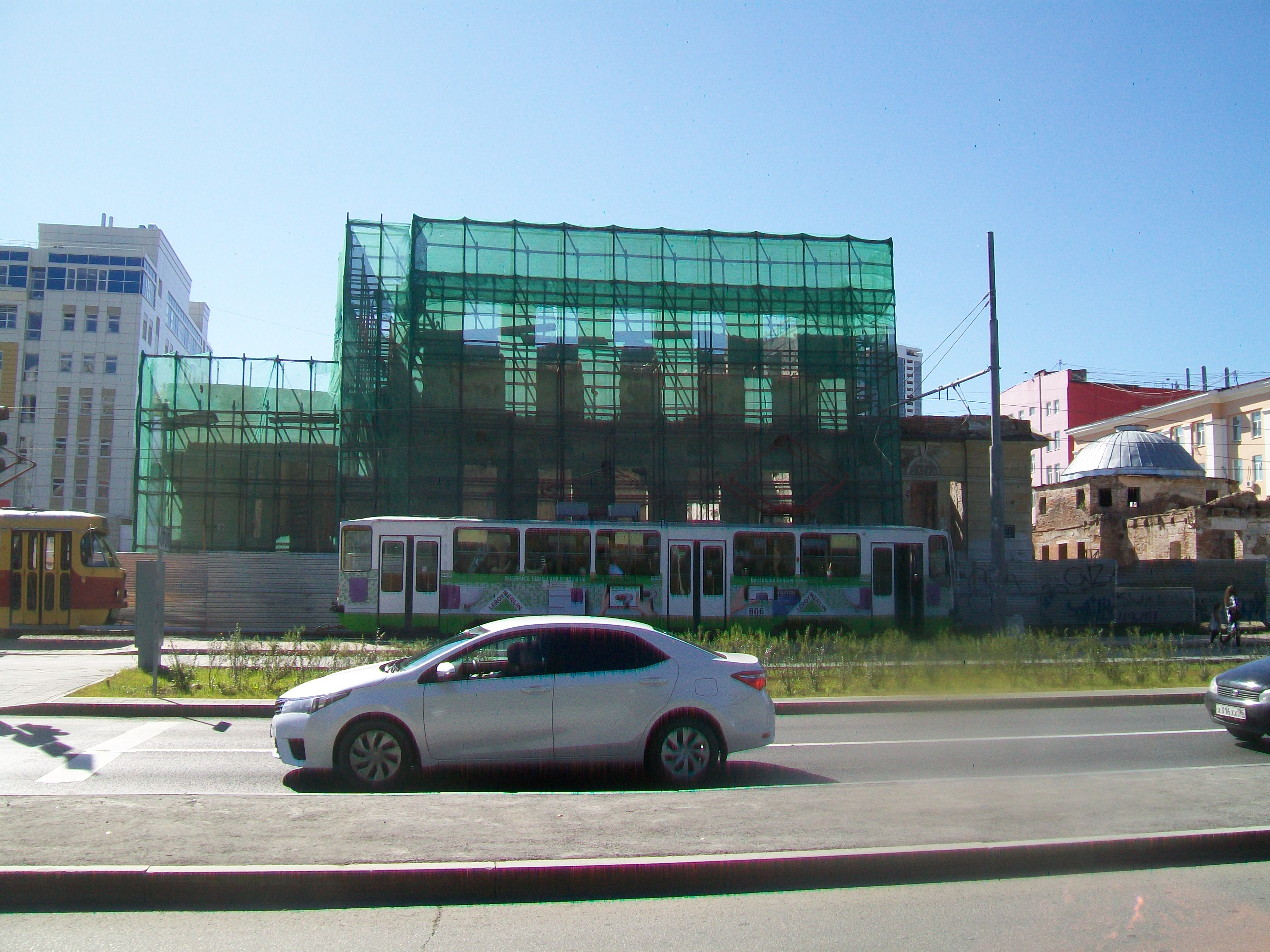 Одно из зданий госпиталя Верх-Исетского завода (Малаховского госпиталя) на реконструкции. ВИЗ-бульвар, Екатеринбург, сентябрь 2017 года